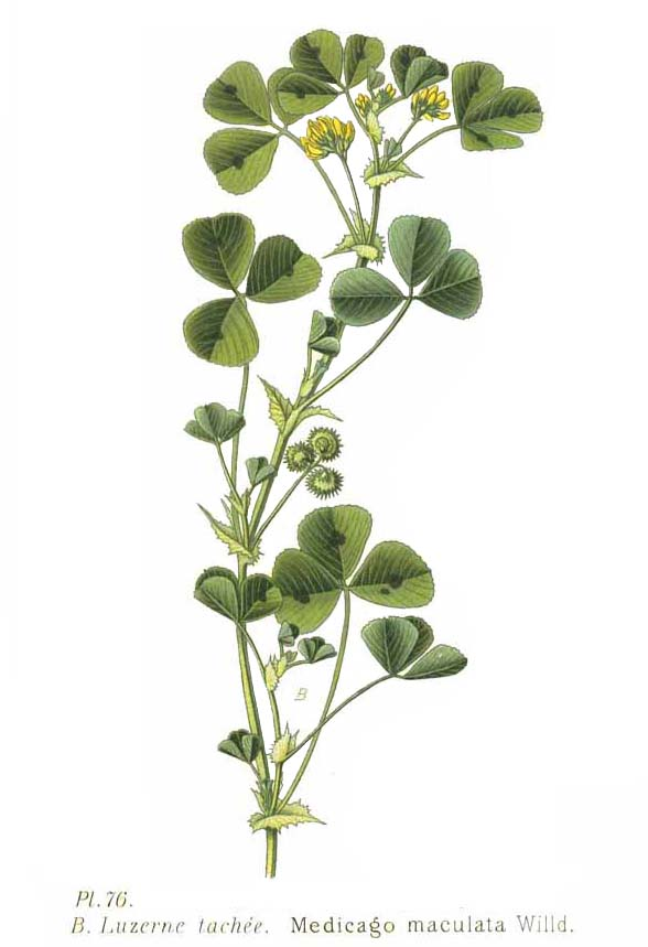 Medicago maculata Willd.